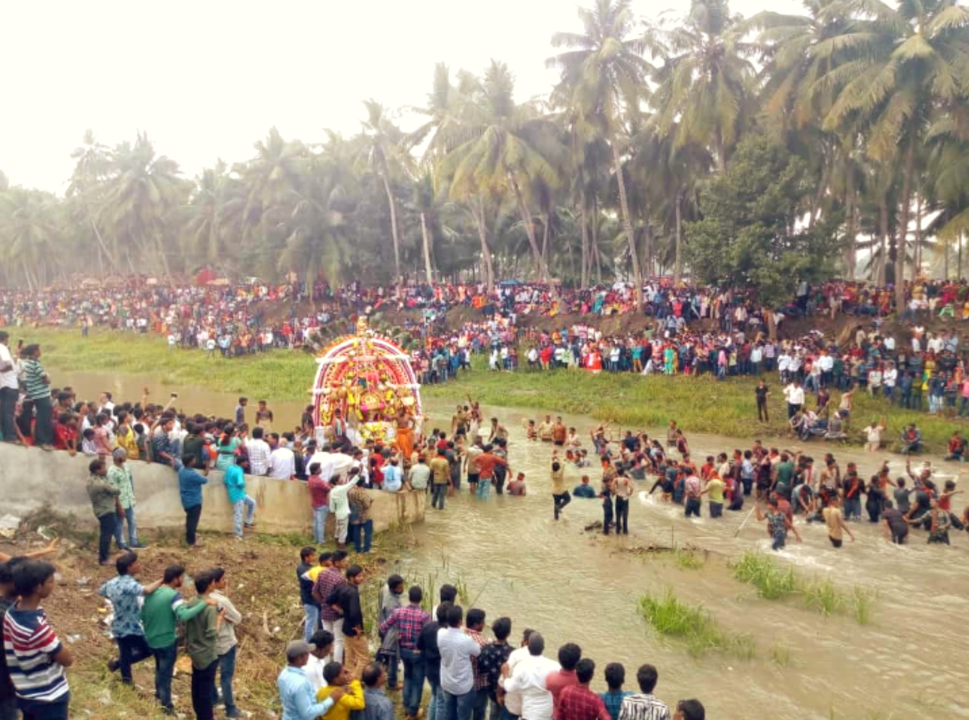 జగ్గన్నతోట ప్రభల తీర్థం